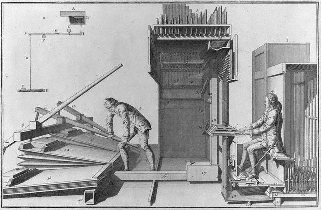 La mia foto di un'acquaforte che possiedo io che risale all'Ottocento